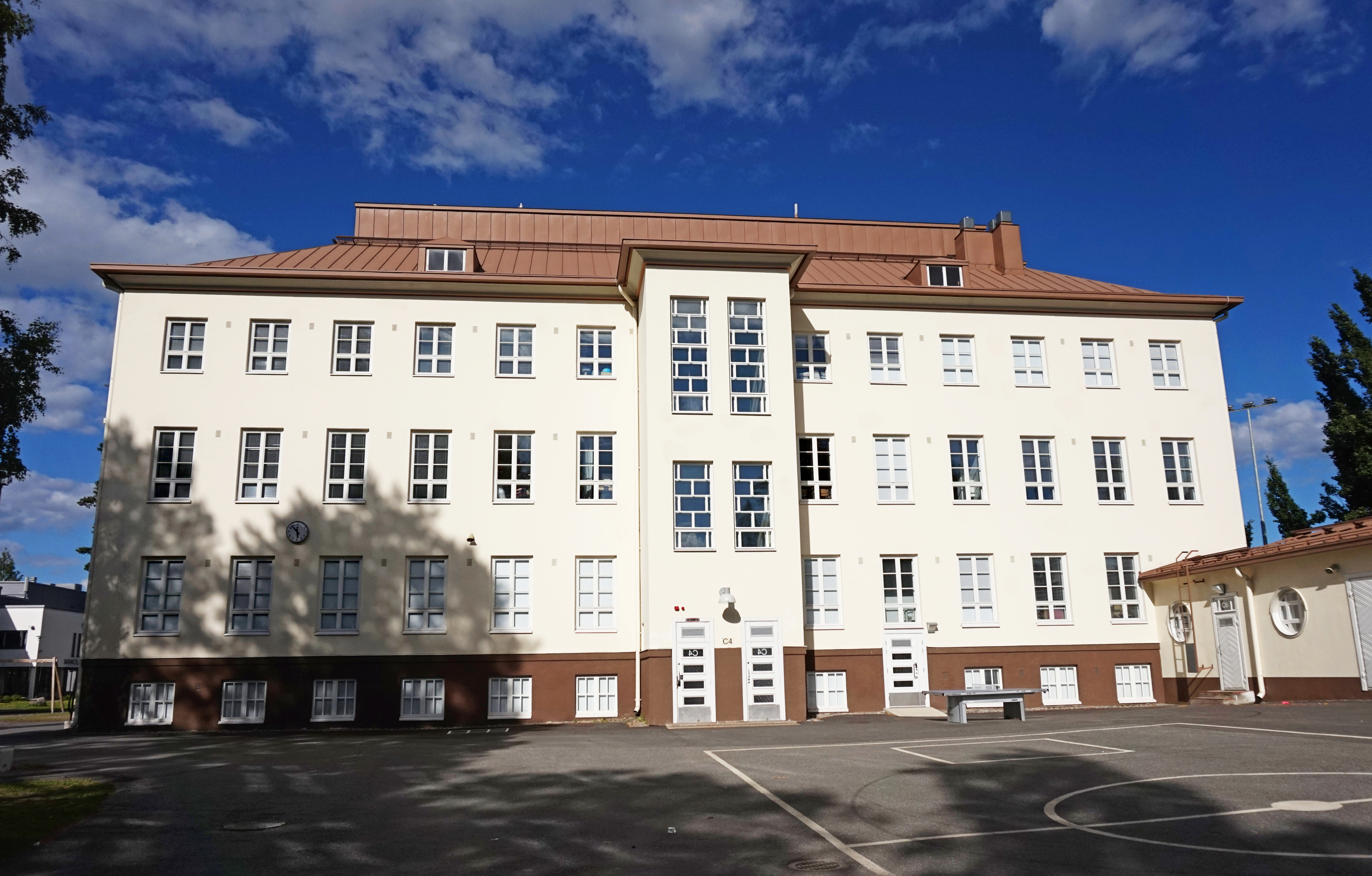 Mankolan alue Jyväskylässä. Rakennus on entinen emäntäkoulu.